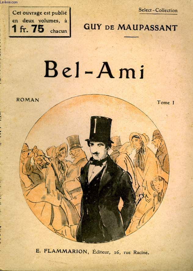 Portada de Bel-Ami